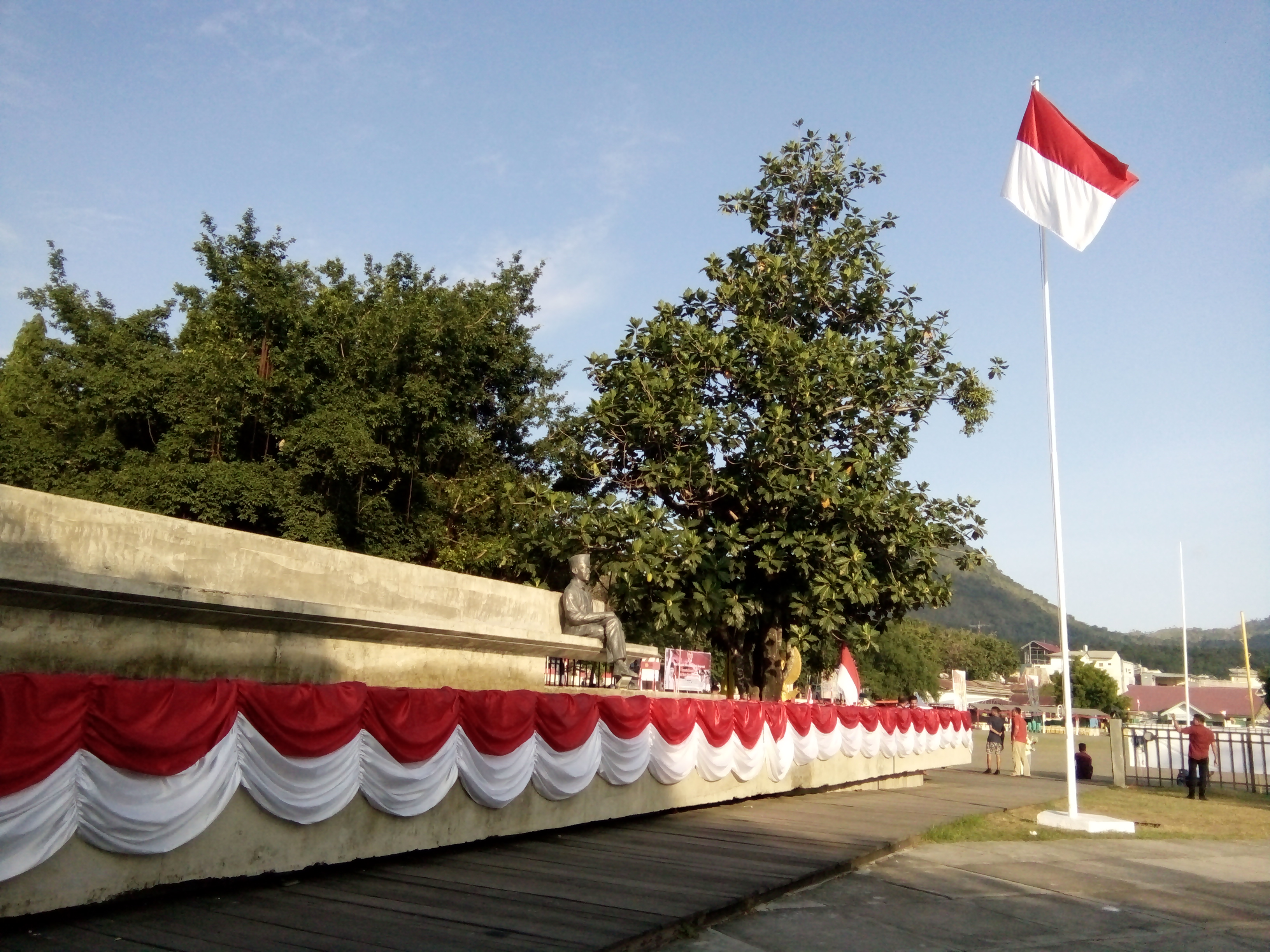 Pohon Sukun Bung Karno di Ende merupakan awal sejarah penemuan falsafah bangsa Pancasila.